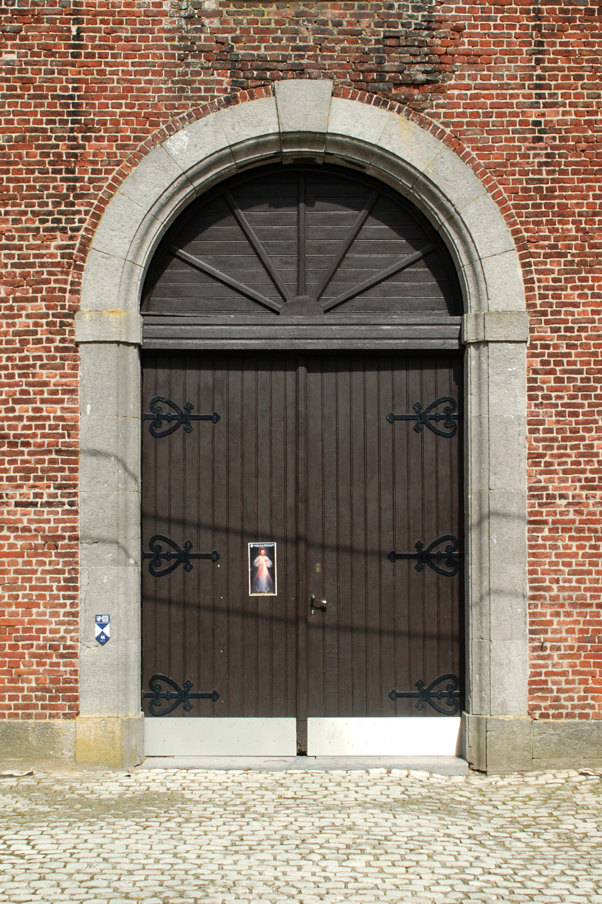 Belgique - Brabant wallon - Genappe - Baisy-Thy - Église Saint-Hubert